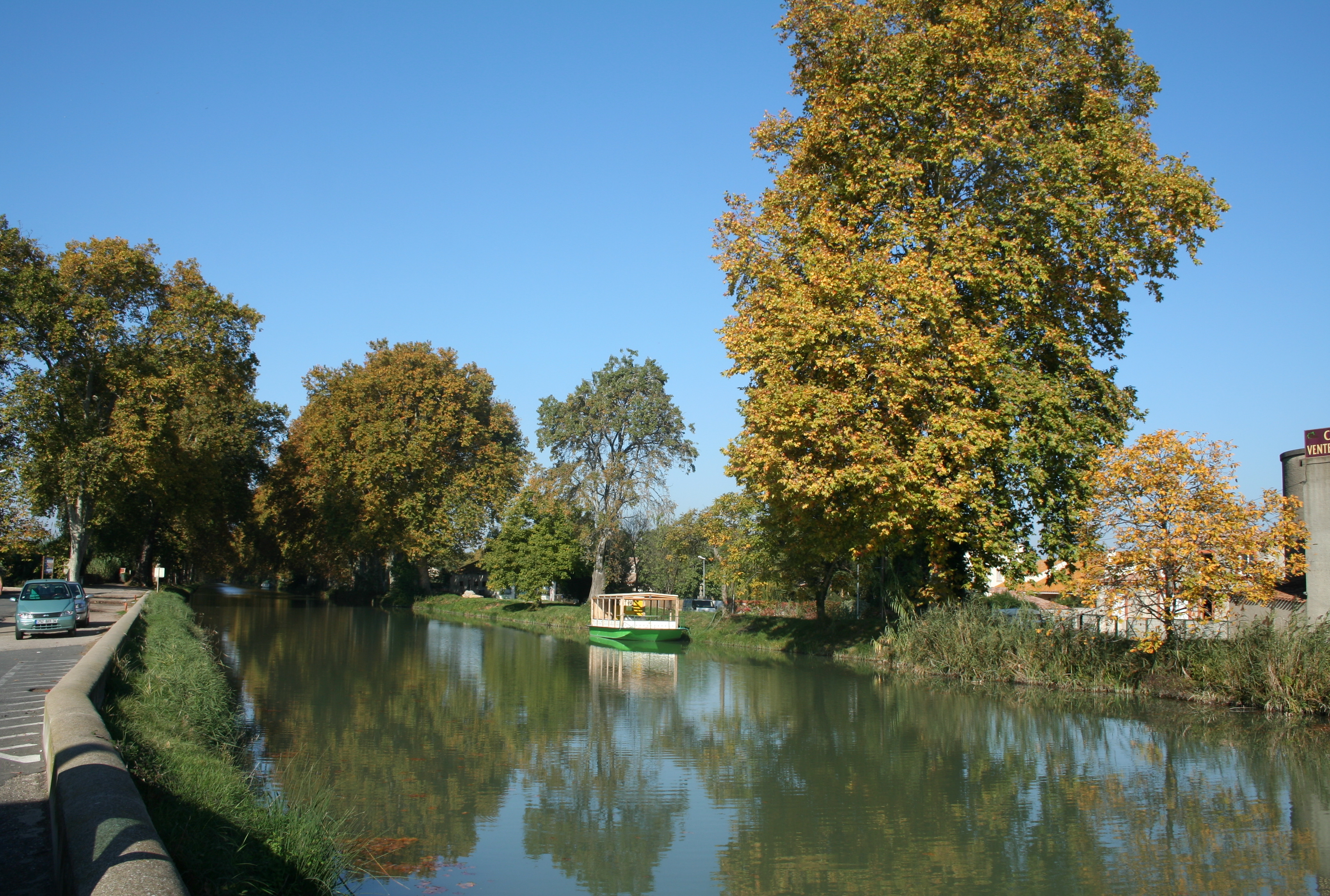 Villeneuve-lès-Béziers (Hérault) - Canal du Midi.